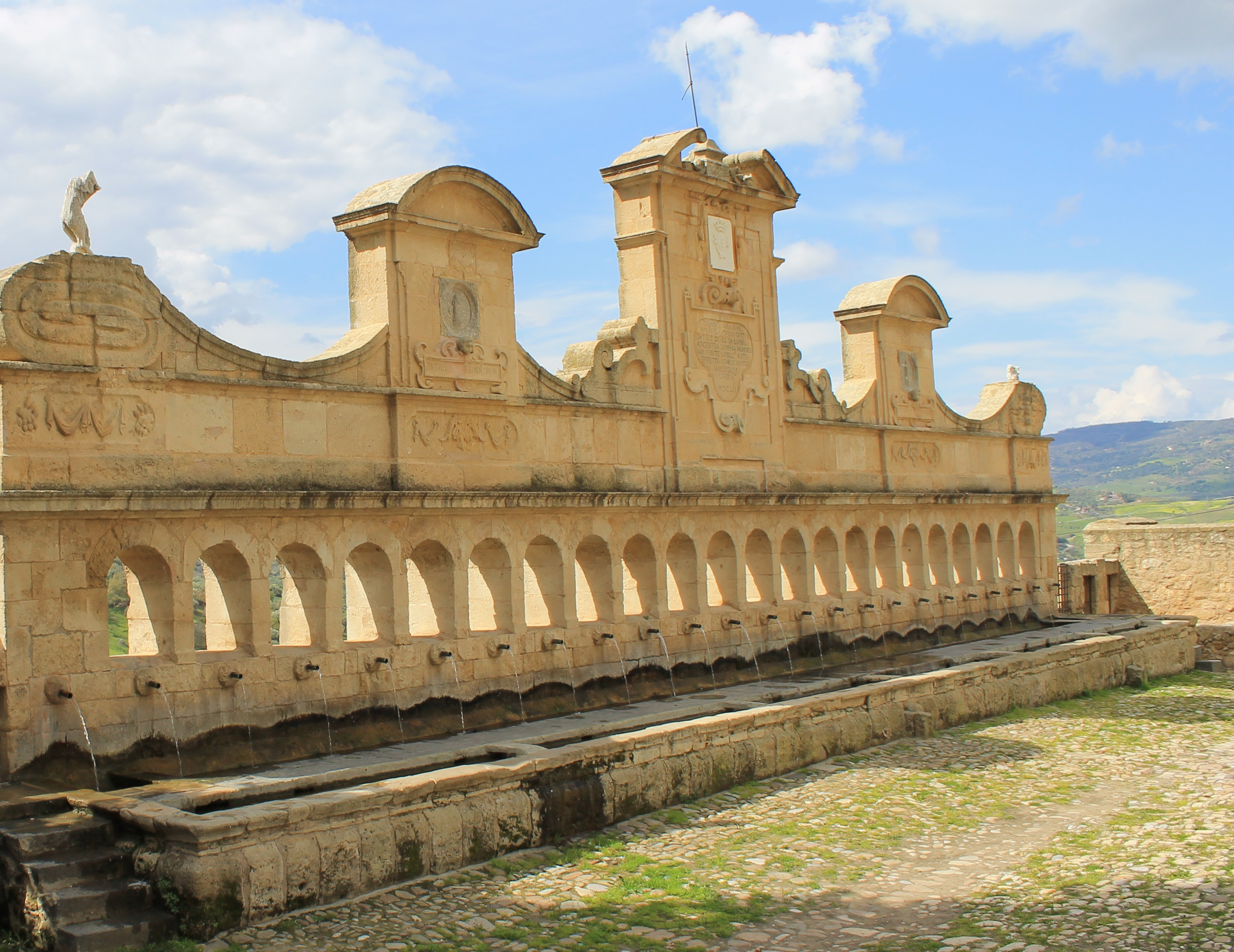 Fontana "Granforte" This is a photo of a monument which is part of cultural heritage of Italy.